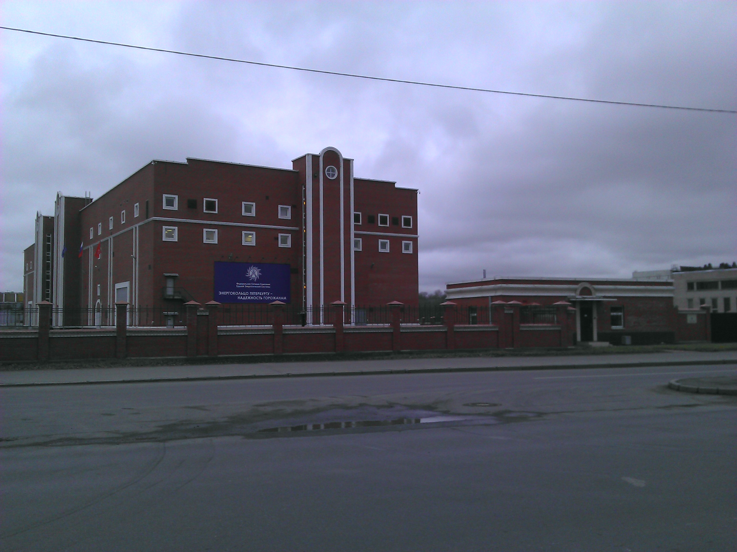 Новый ОПУ подстанции 330 кВ «Волхов-Северная».